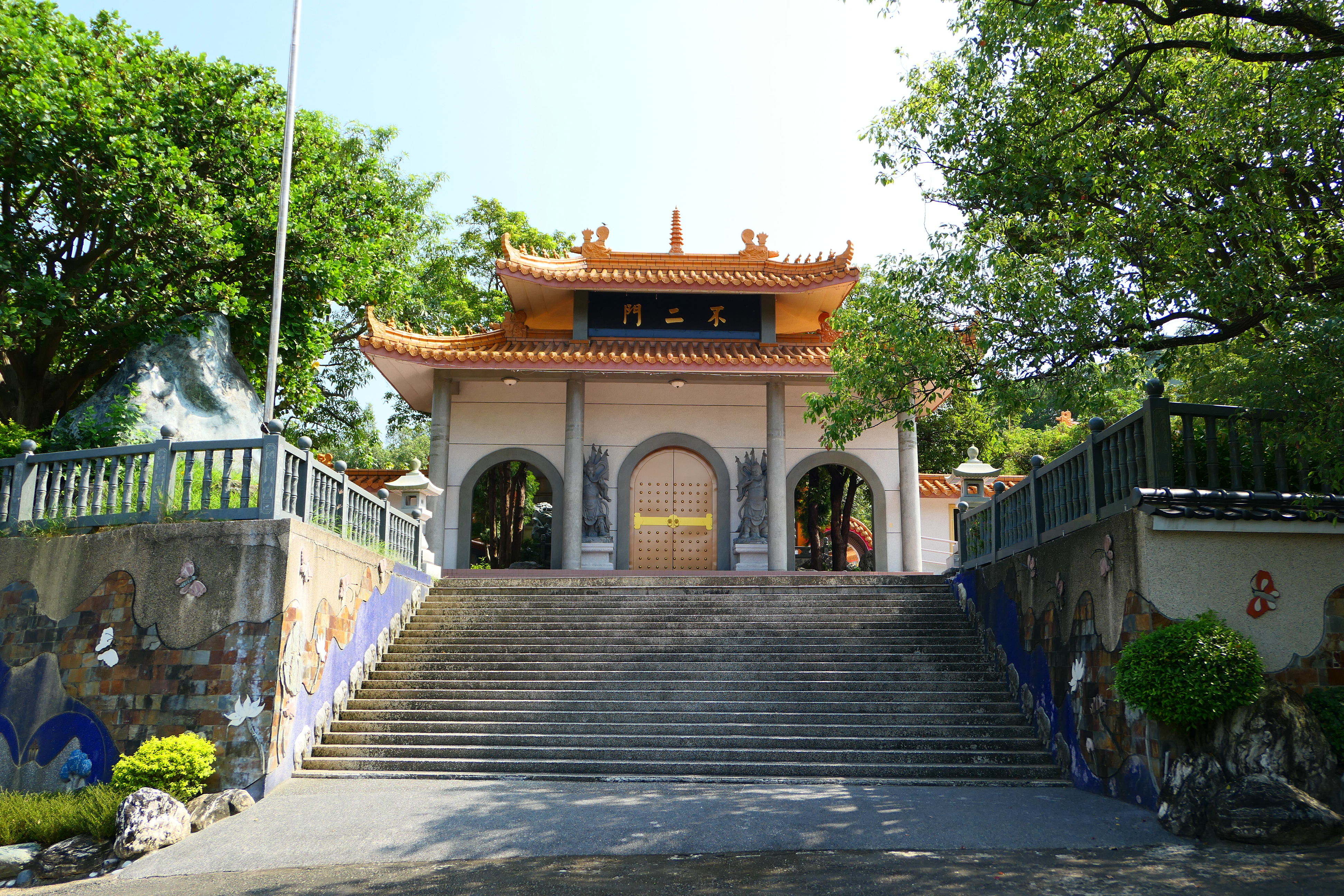 千佛山菩提寺不二門